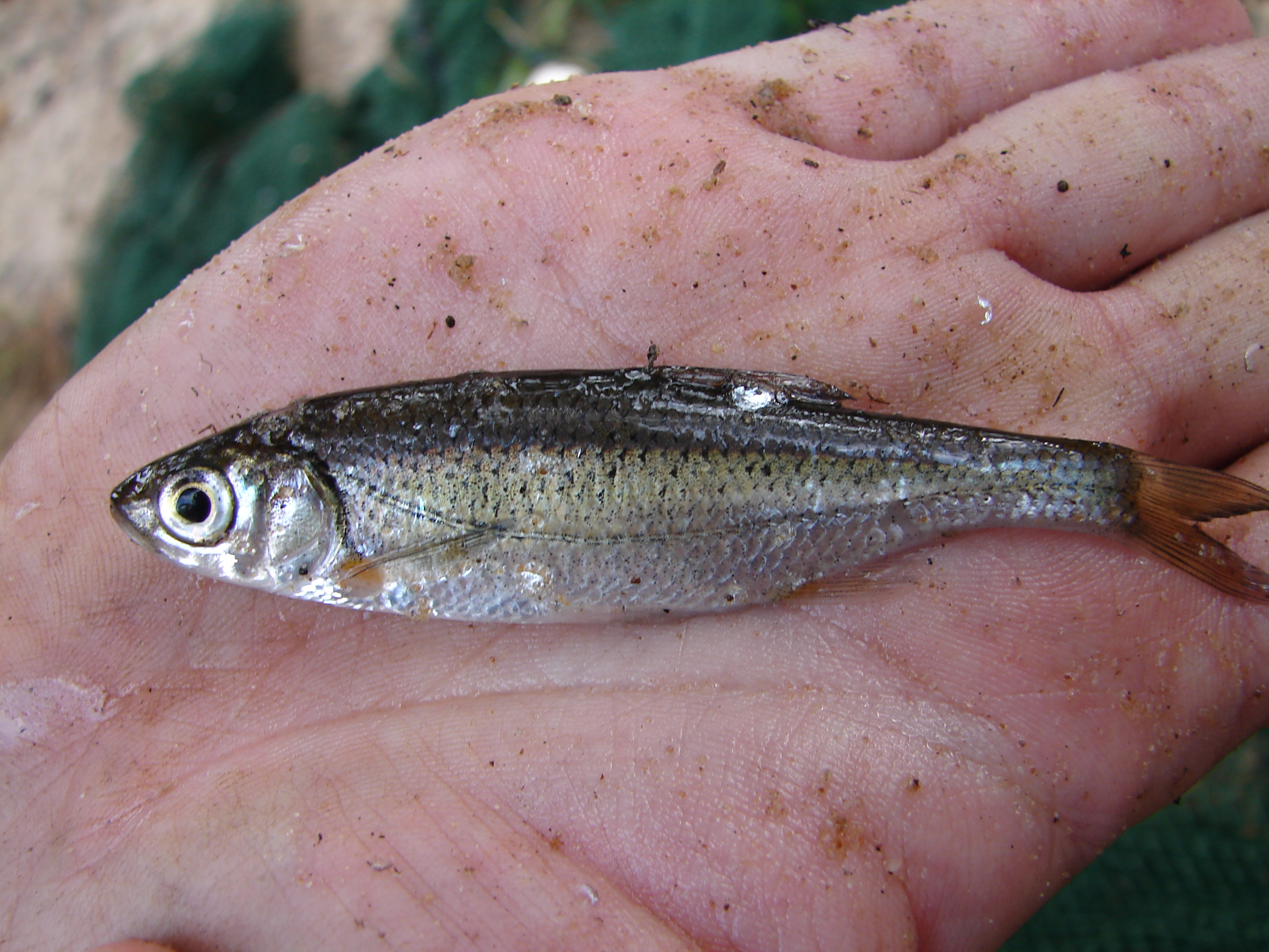 Річка Уборть, басейн Дніпра